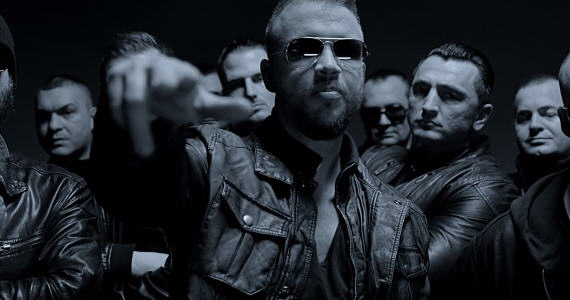 Videoausschnitt zu „AKs im Wandschrank“